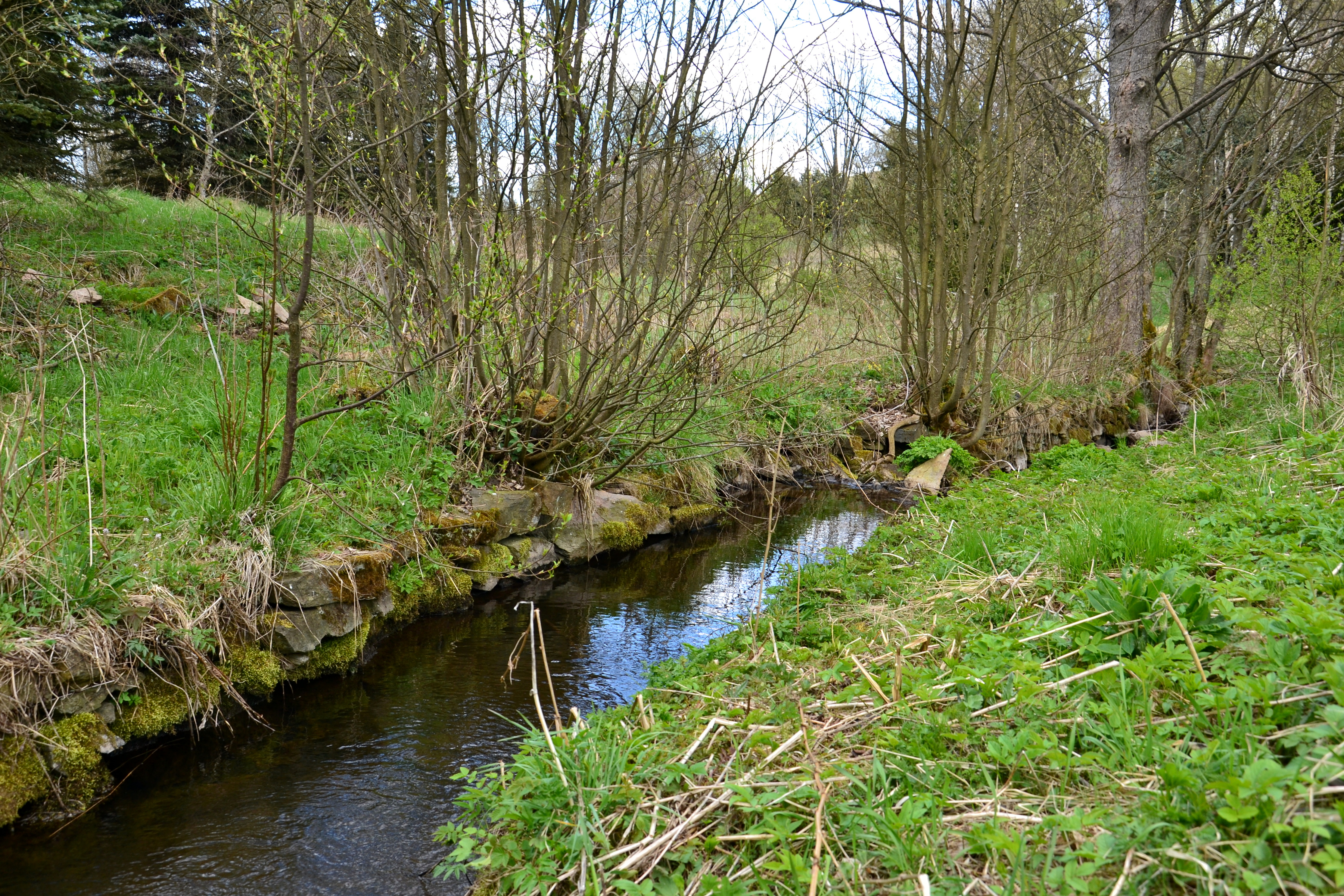 Hamerský potok v Dolině